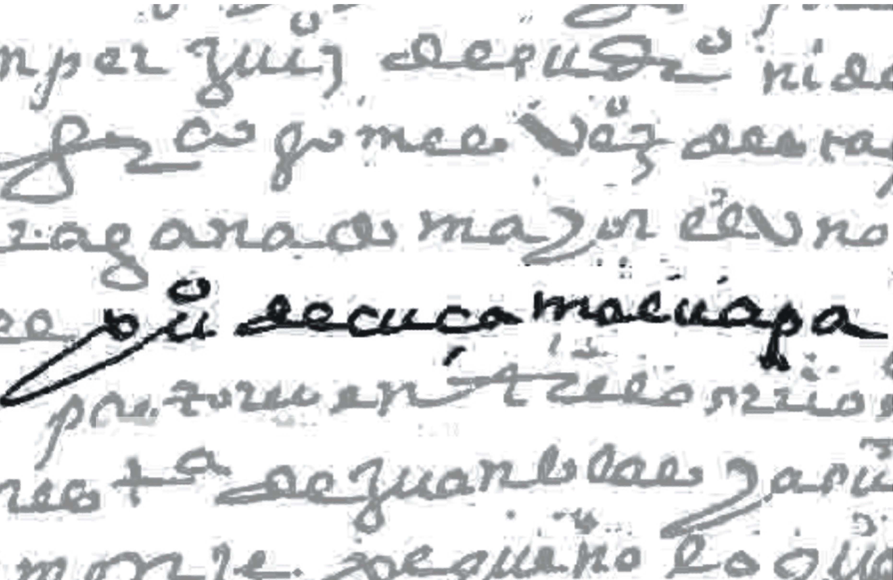 Fragmento del texto de una merced de 1583. (Modificado los tonos).